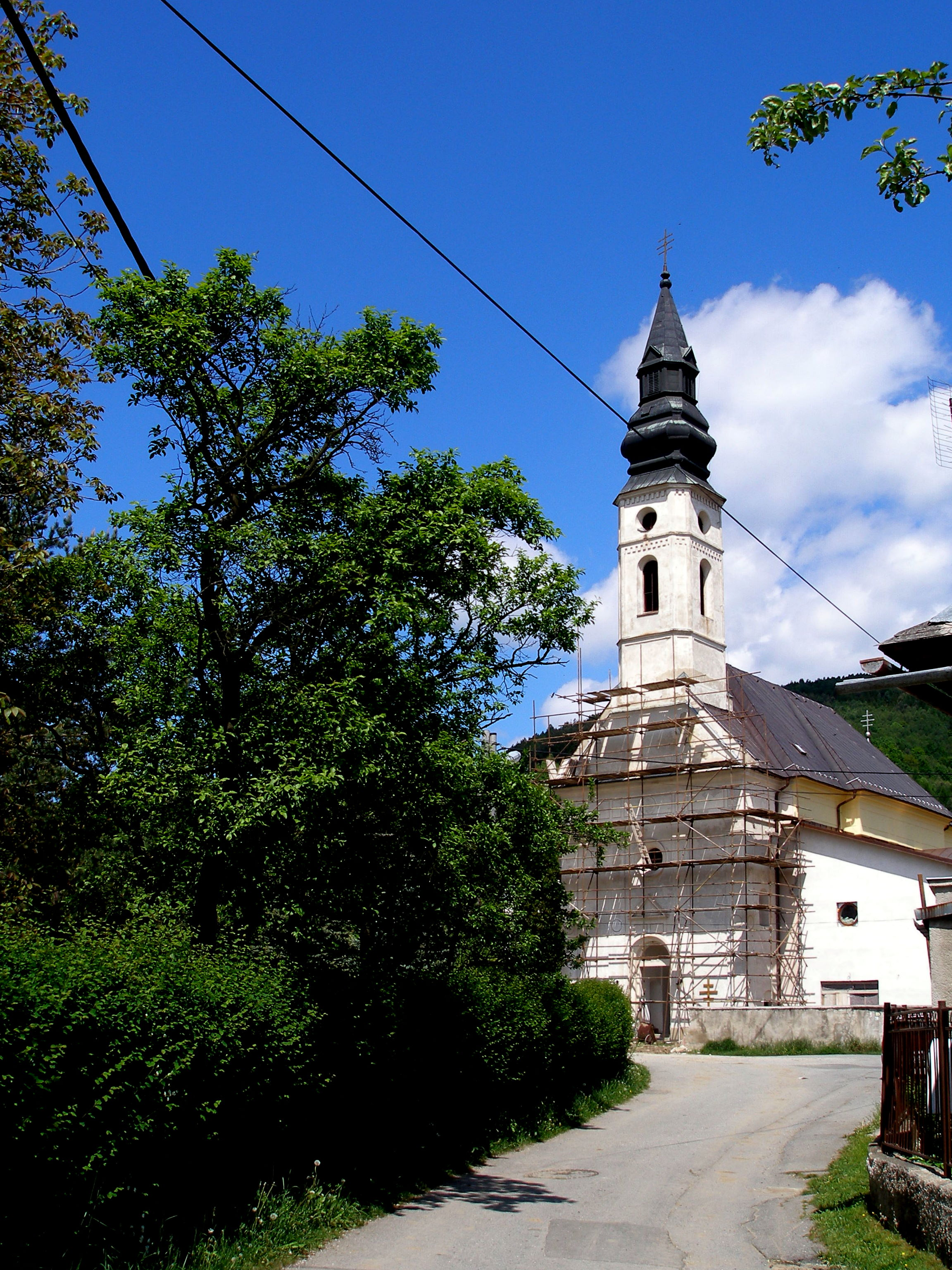 Obec Ľutina okres Sabinov. This medium shows the protected monument with the number 708-318/0 in the Slovak Republic.